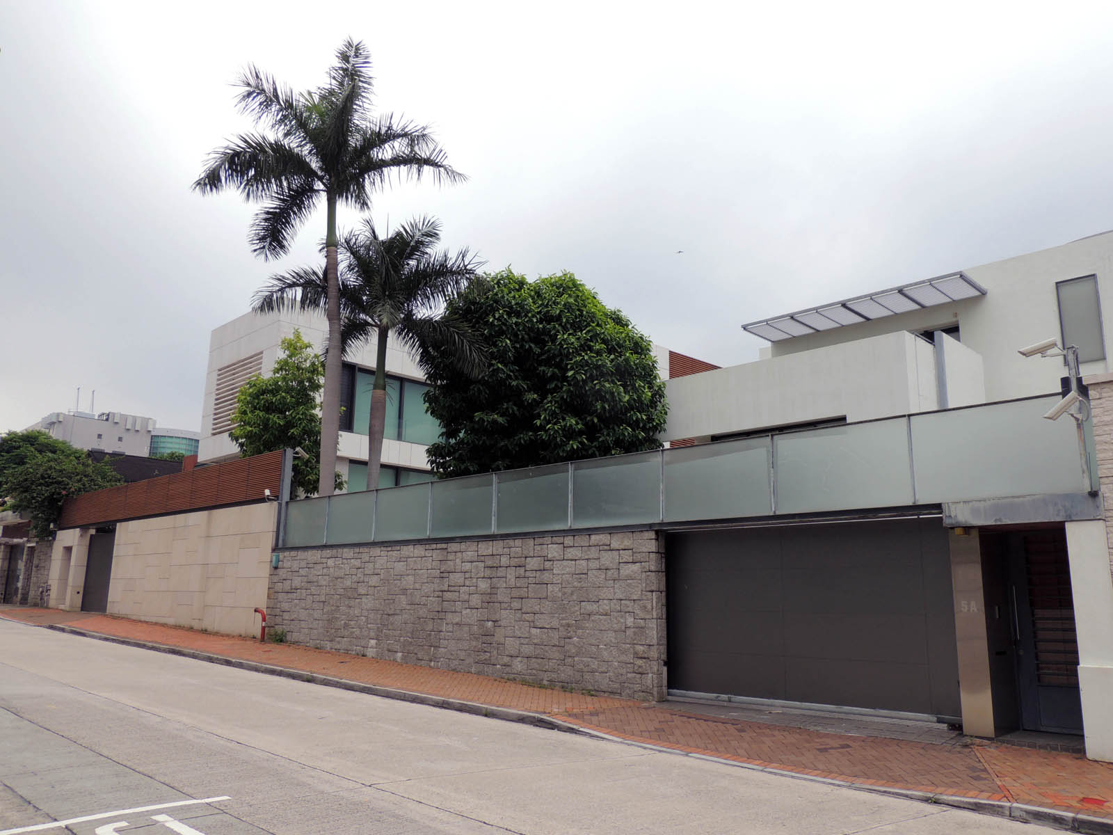 No 5, 7 York Road Hong Kong.JPG